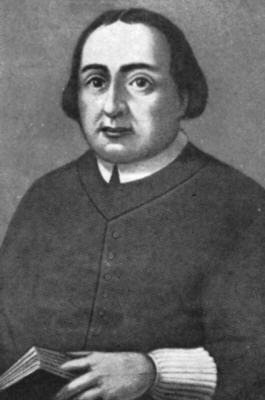 Kaplan Andreas Faulhaber aus Glatz, Martyrer des Beichtgeheimnisses